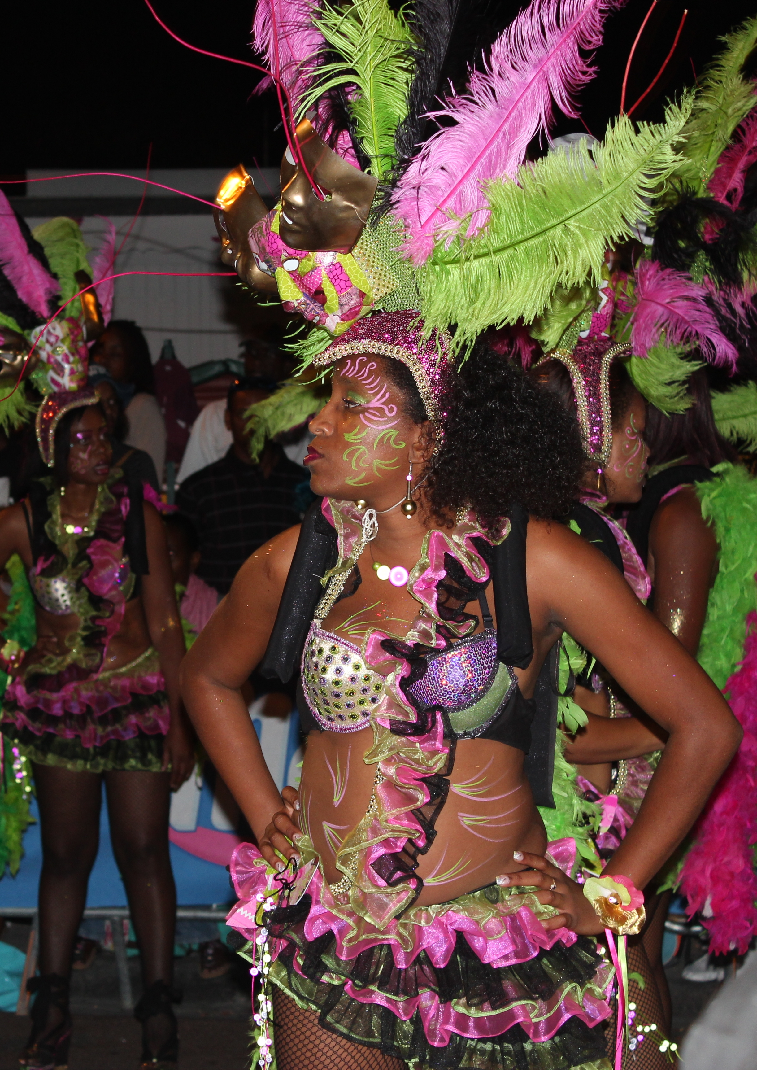 Défilé du lundi 11 février 2013 à Saint-François (Guadeloupe)